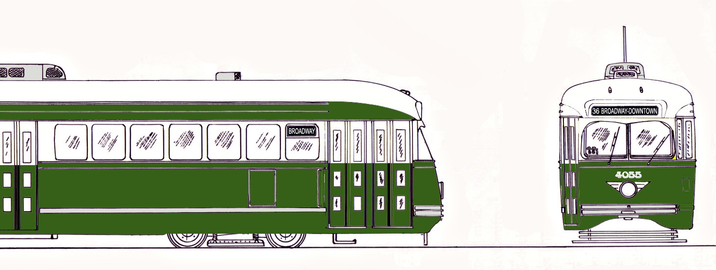 «Kleurenschema: CTA - Chicago Transit Authority : PCC Cars gebouwd door St. Louis Car Co., 1947-8 : Series: 4052-4061, 4372-4411, 7035-7114 & 7115-7274» (originele titel)